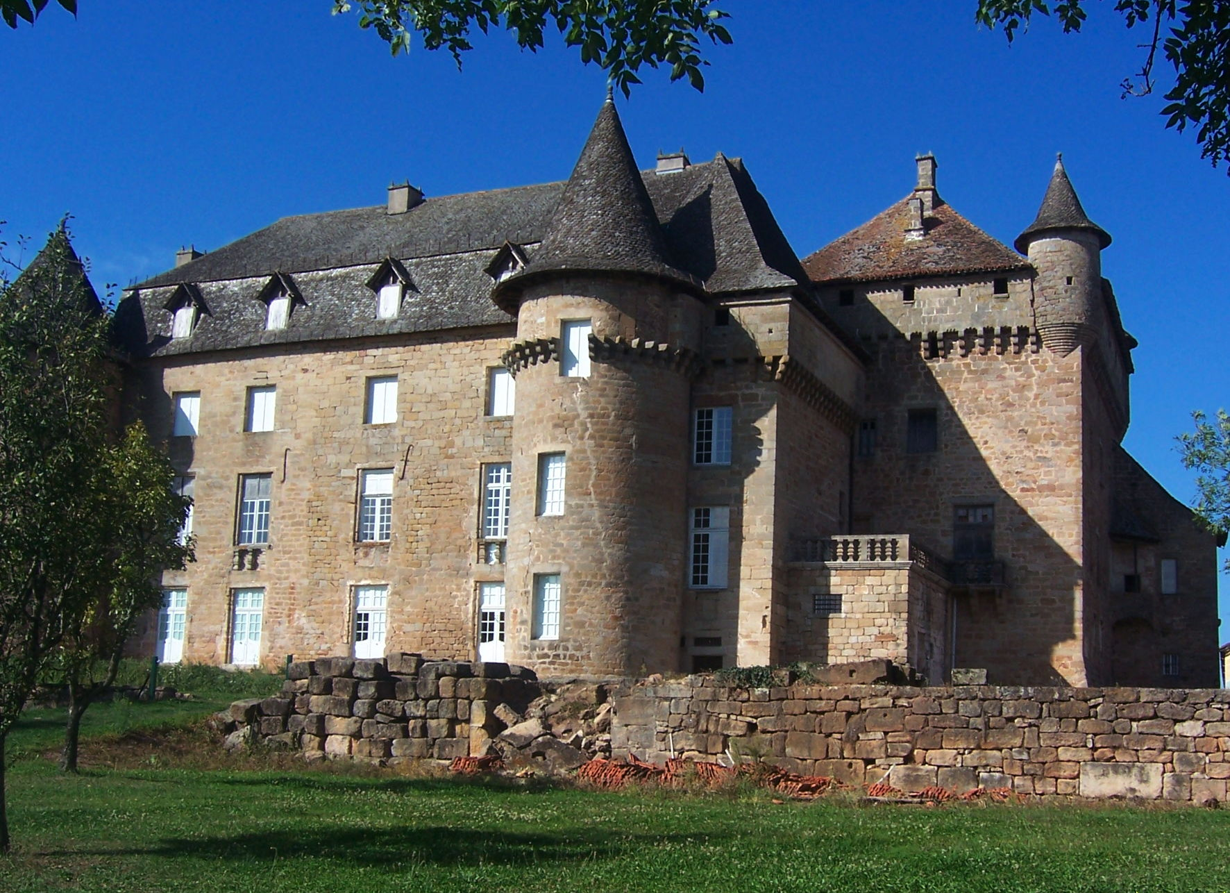 Château de Lacapelle-Marival, vue de la façade Sud - Castle of Lacapelle-Marival seen by the south.